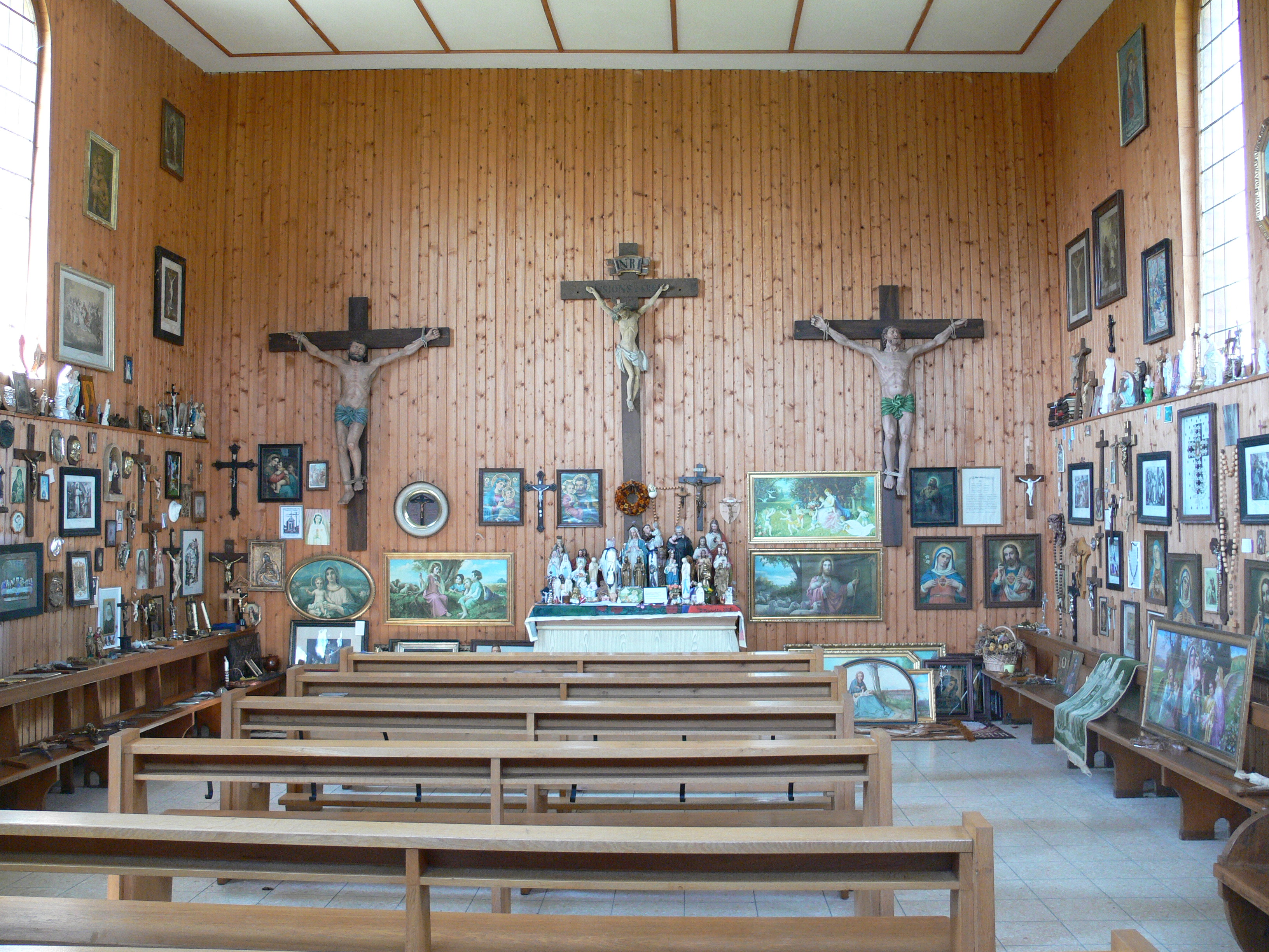 Alte Wallfahrtskapelle Witterschnee (Schneekreuz), Löffingen Innenansicht